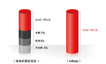 経験変数の排除